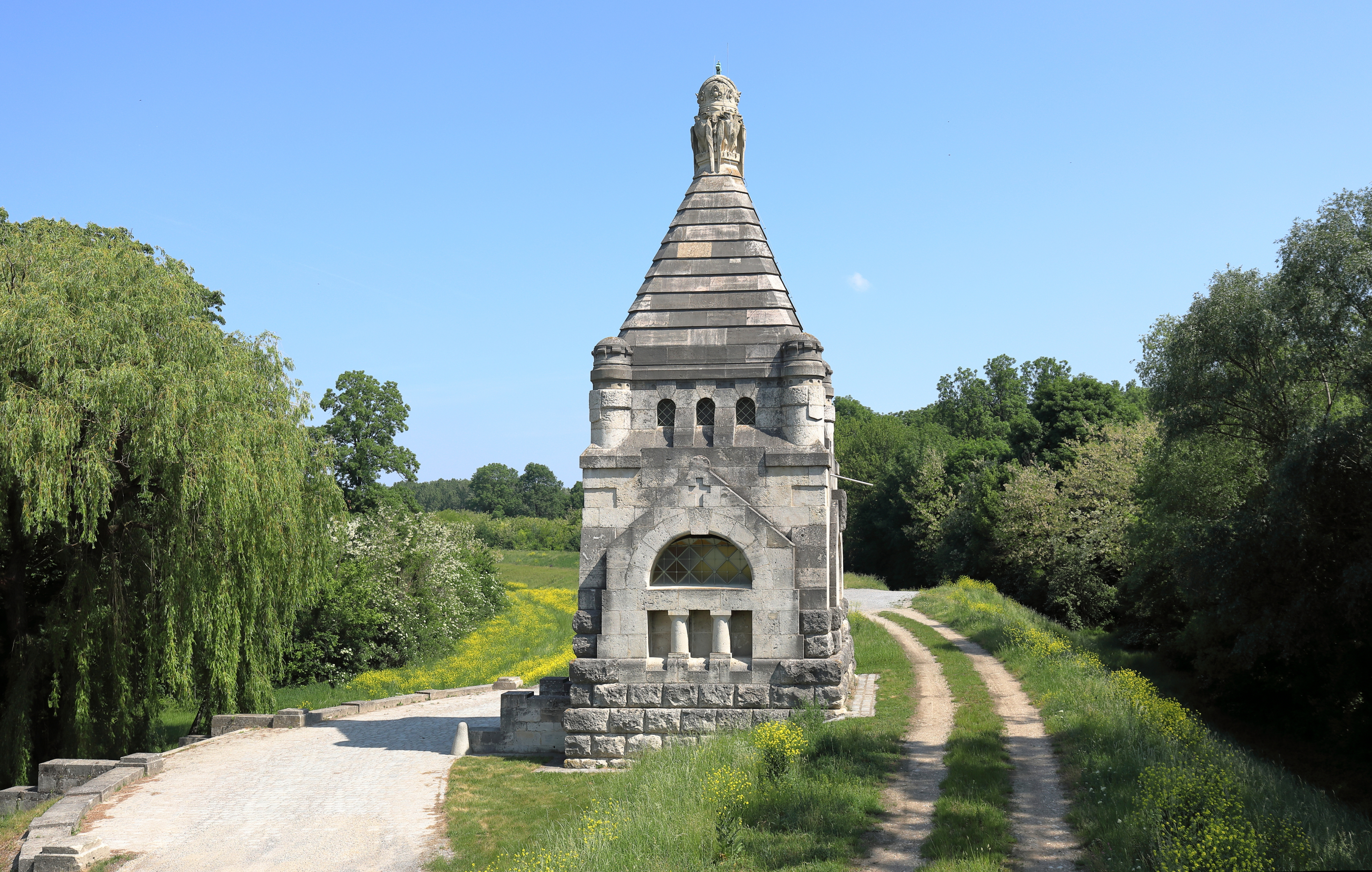 Die Marchdammkapelle in Markthof, eine Ortschaft in der niederösterreichischen Marktgemeinde Engelhartstetten.Die Gedächtniskapelle wurde nach Plänen der Architekten Max Hegele und August Rehak anlässlich der Vollendung des Hubertus- bzw. Marchdammes, der eine Bauzeit von 40 Jahren hatte, auf diesem errichtet. Bei der Eröffnung des Dammbauwerkes und der Kapelle am 10. Juni 1905 sprachen neben Kaiser Franz Joseph I. Weihbischof Godfried Marschall sowie Erich von Kielmansegg als Statthalter von Niederösterreich.